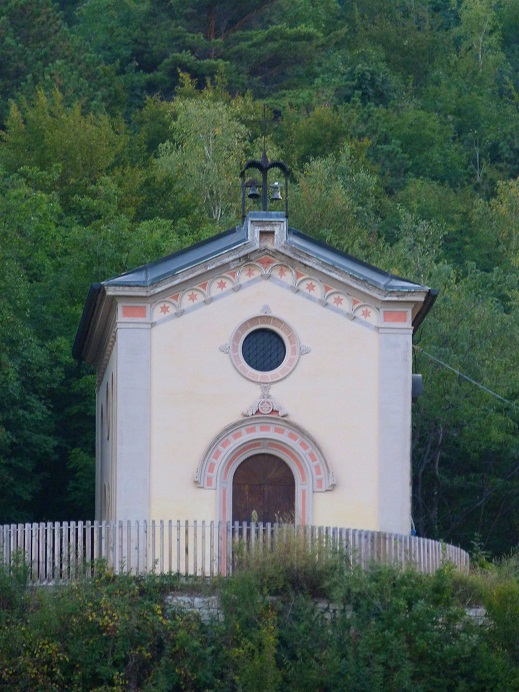 chiesetta di san g.